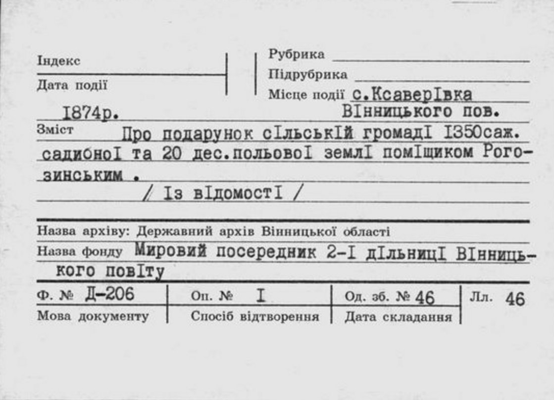 Село Ксаверівка Вінницького повіту. Подарунок 1350 саженців садибної та 20 дес.польової землі